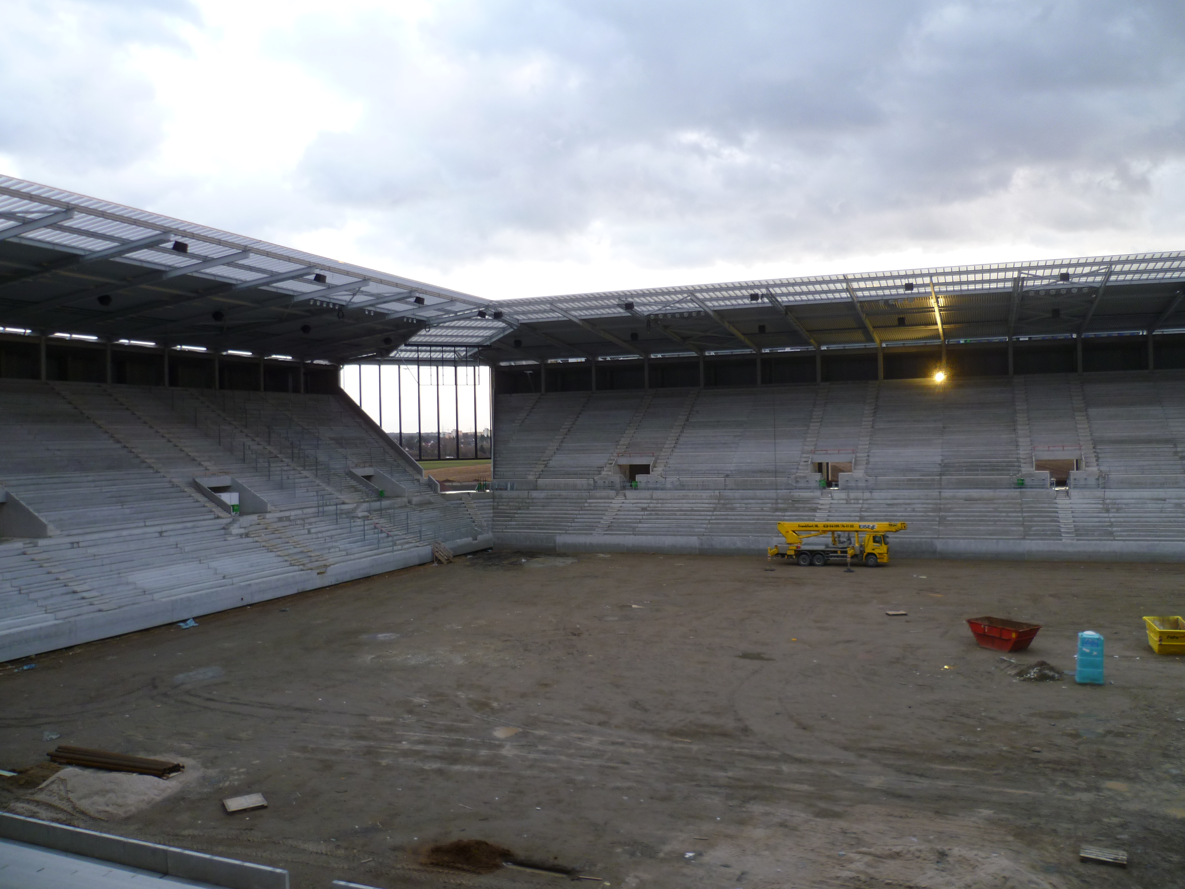 Die Coface Arena mit Blick auf den Gästeblock